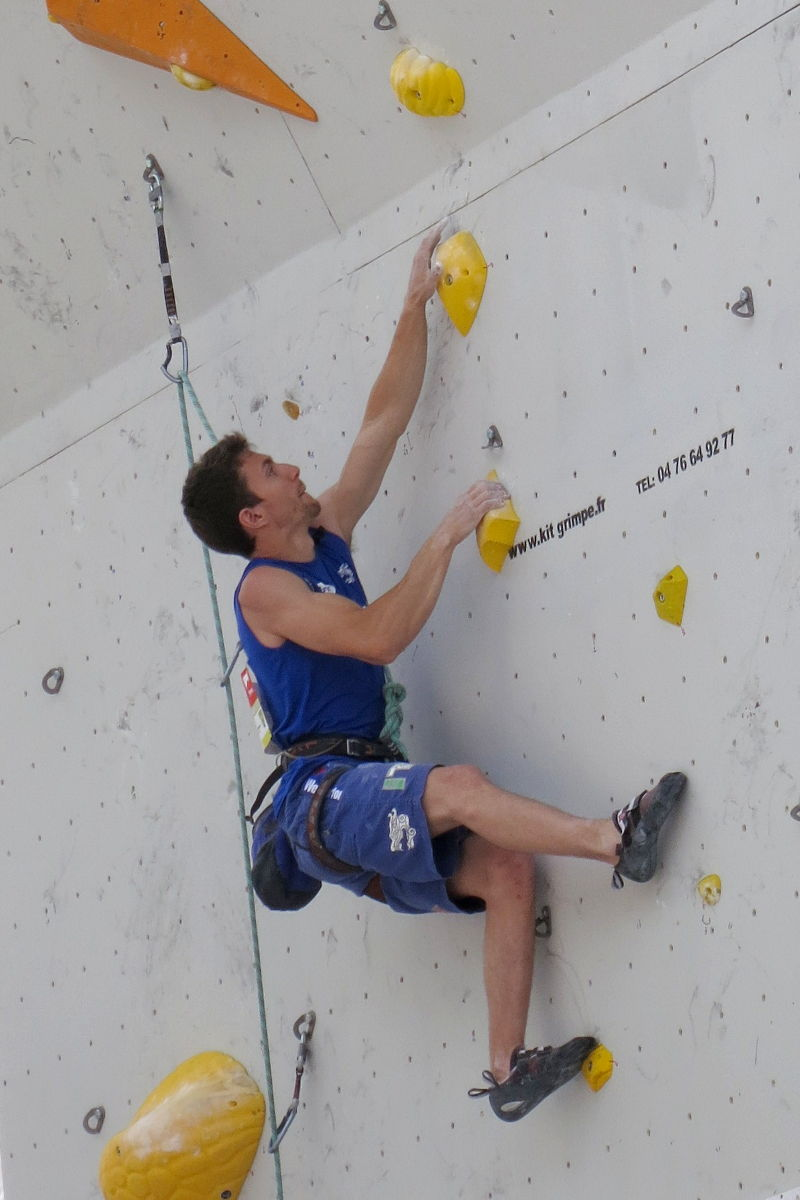 Stefano Ghisolfi en demi-finale du championnat d'Europe d'escalade (difficulté) 2013 à Chamonix